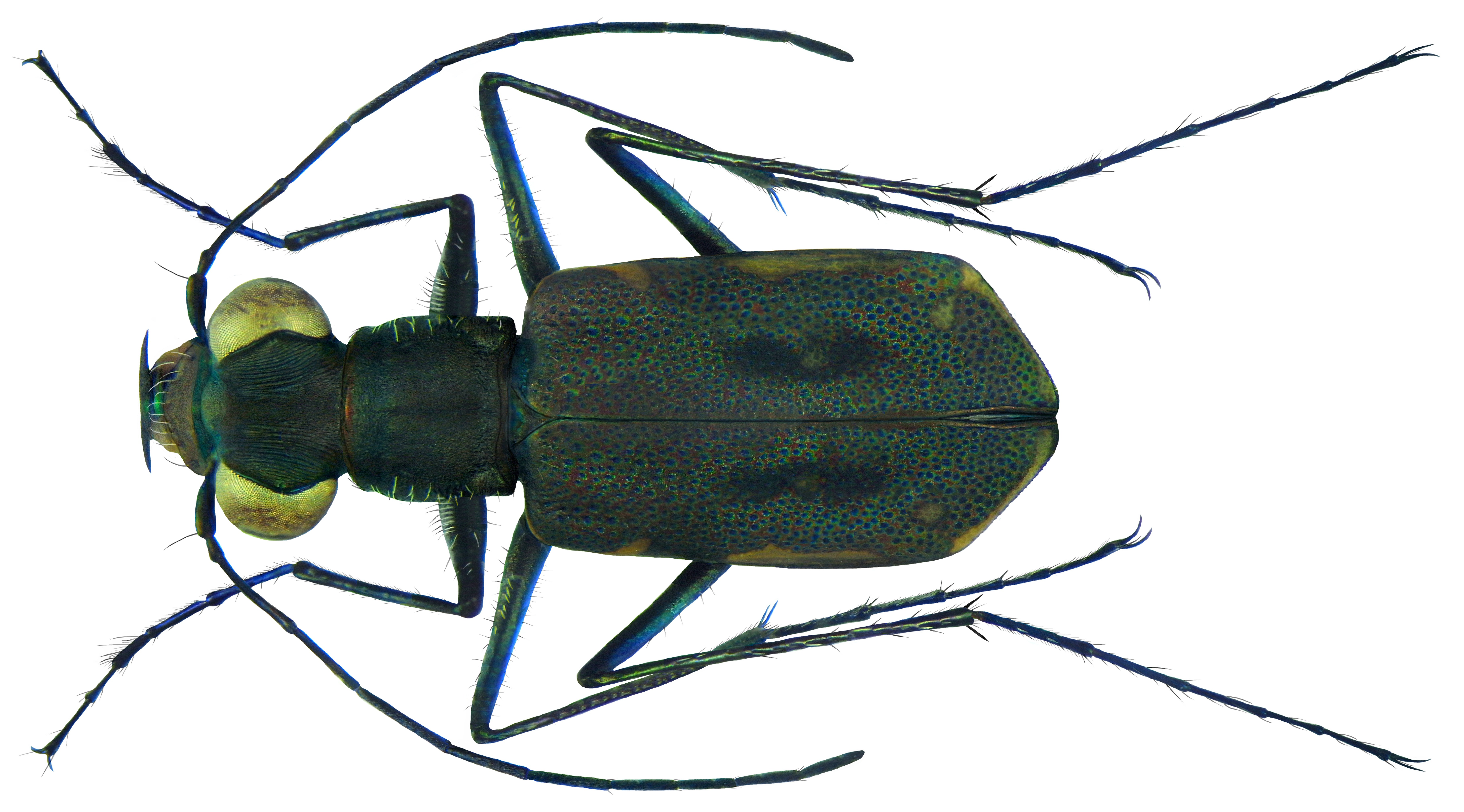 Familie: Carabidae Groesse: 8,7 mm Fundort: Indonesien, Irian Jaya, Kaimana, Omba (Yamor) - River leg. A.S., 2011; det. J.Wiesner, 2011 Photo: U.Schmidt, 2011